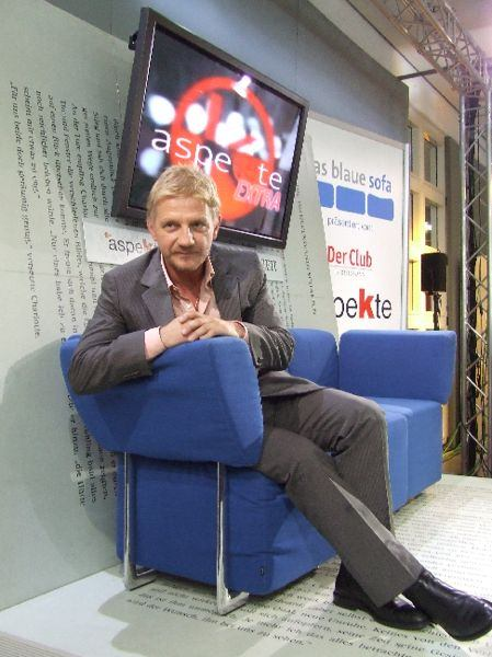 Sönke Wortmann auf der Buchmesse 2006 in Frankfurt am Main